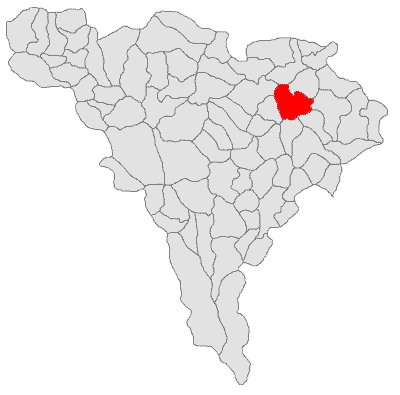 Categorie:Hărţi ale judeţului Alba